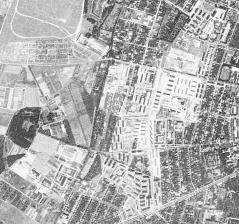 Budowa osiedli i bloków na poznańskim Grunwaldzie, w osi ulicy Grochowskiej, sfotografowana przez amerykańskiego satelitę wywiadowczego KH-4A 1023, 23 sierpnia 1965 r.